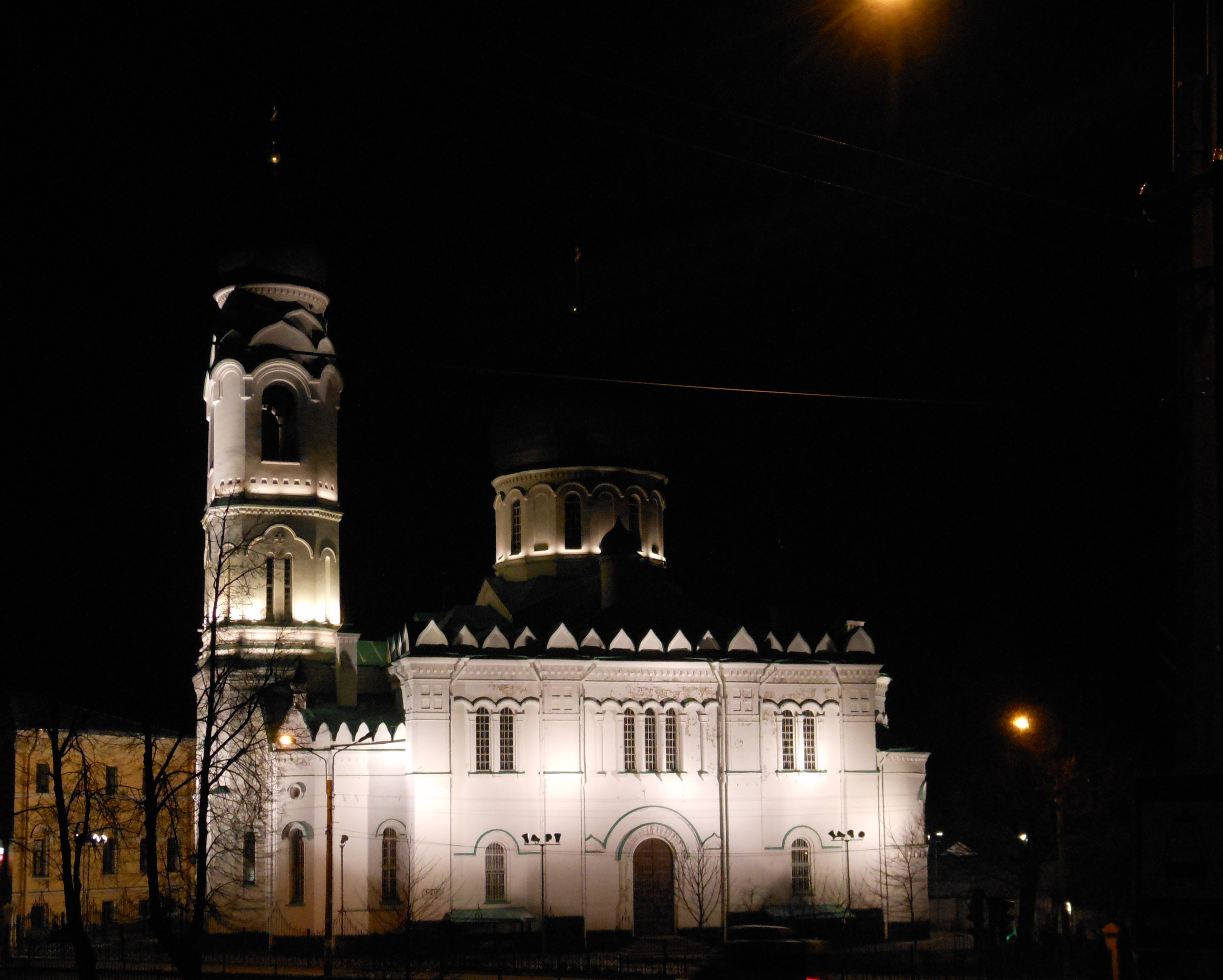 Hl. Michaelkirche in Oranienbaum Russland